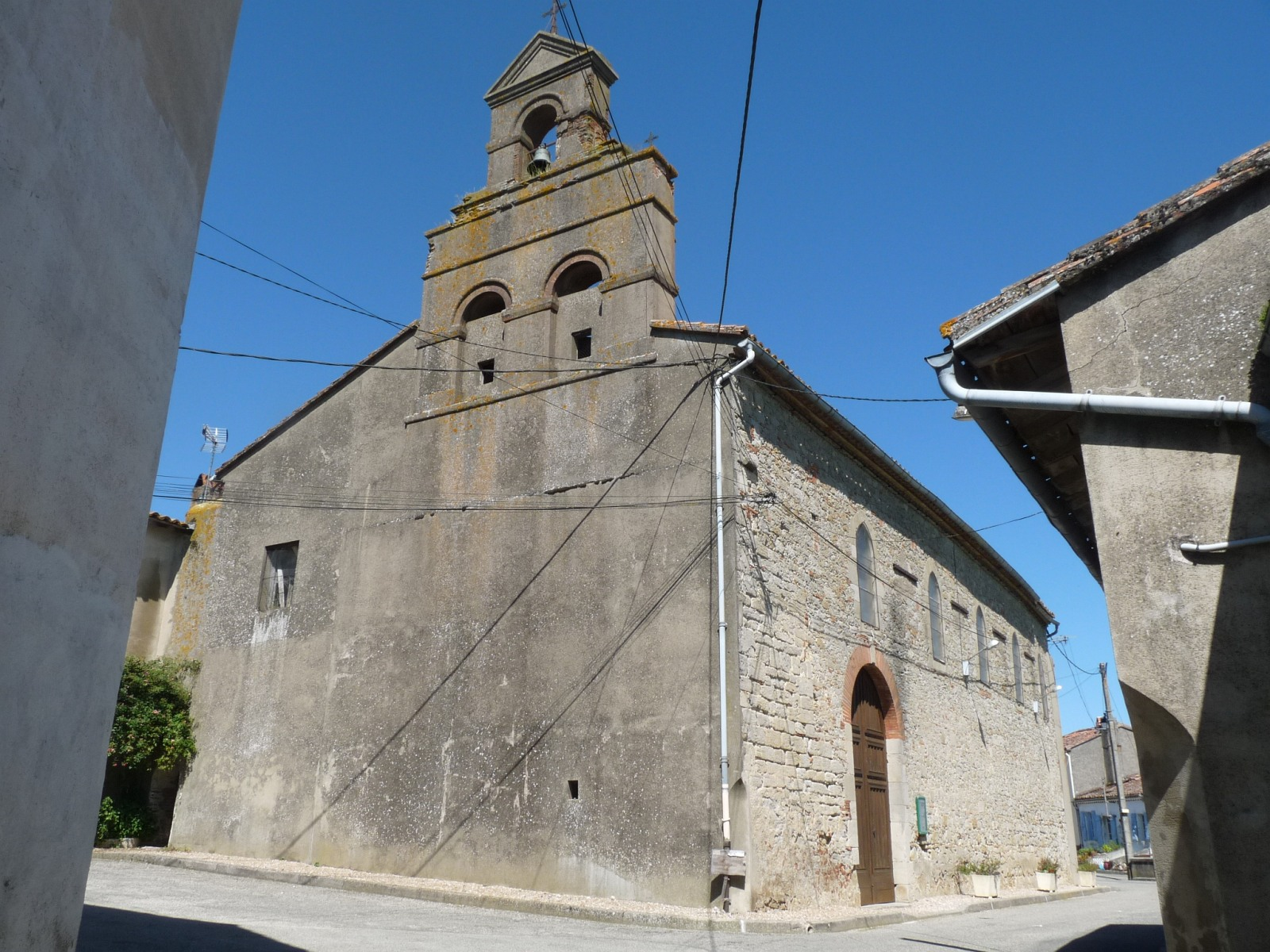 Eglise Saint-Étienne du Faget, Haute-Garonne, France